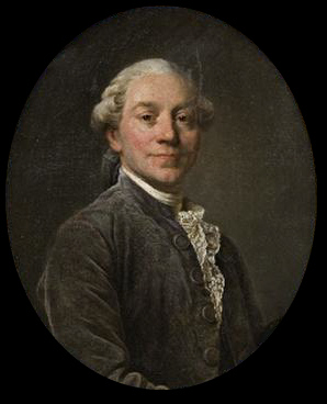 Portrait d'Antoine-Léonard Thomas